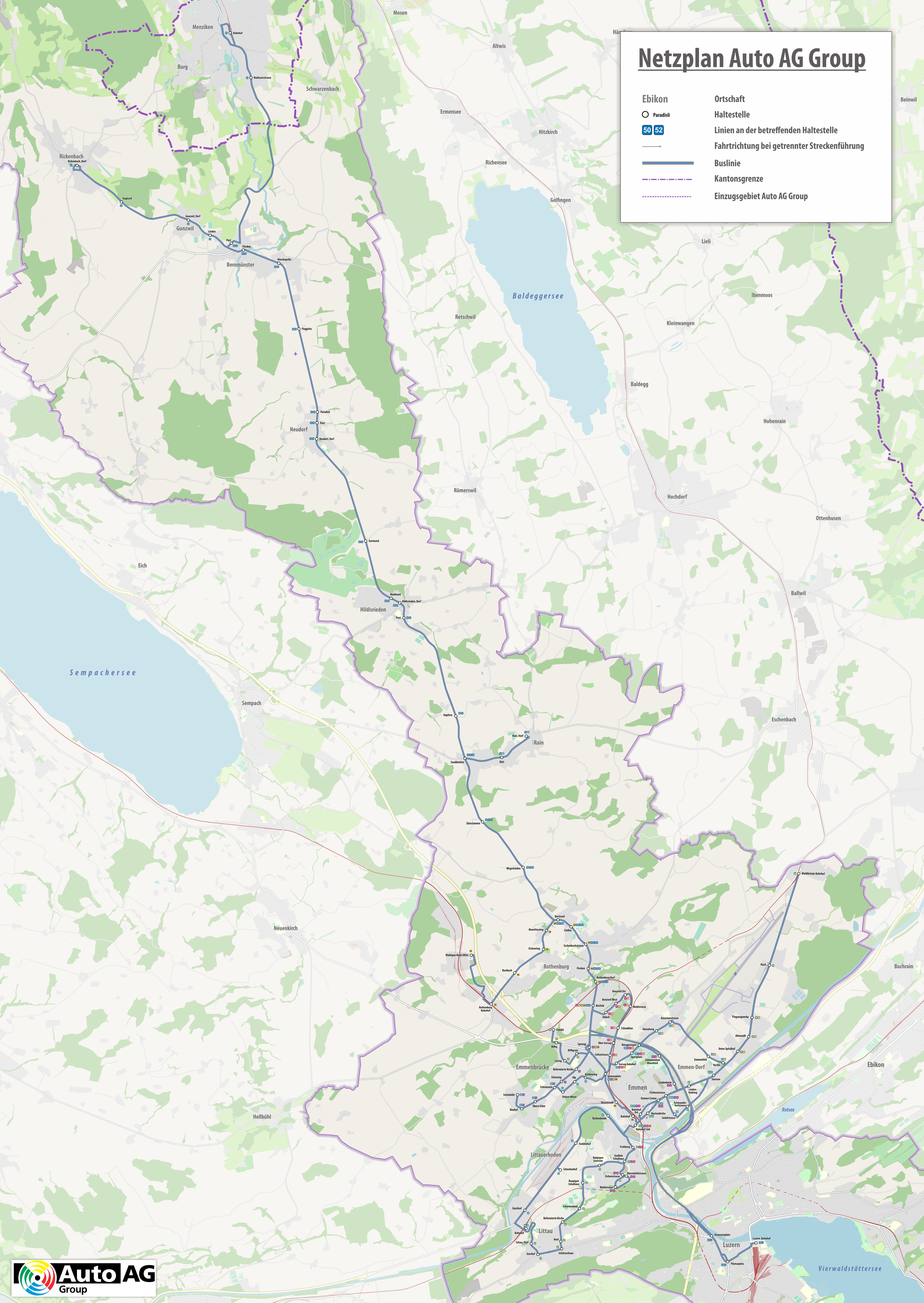 Liniennetzplan Auto AG Group